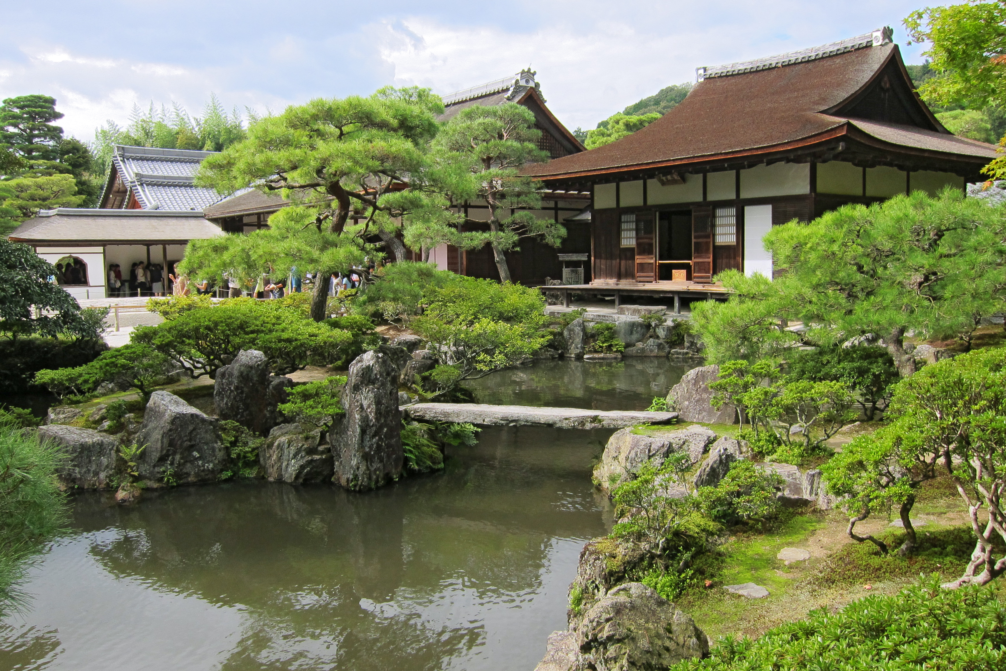 Ginkakuji (銀閣寺), Kyoto, Kyoto prefecture, Japan